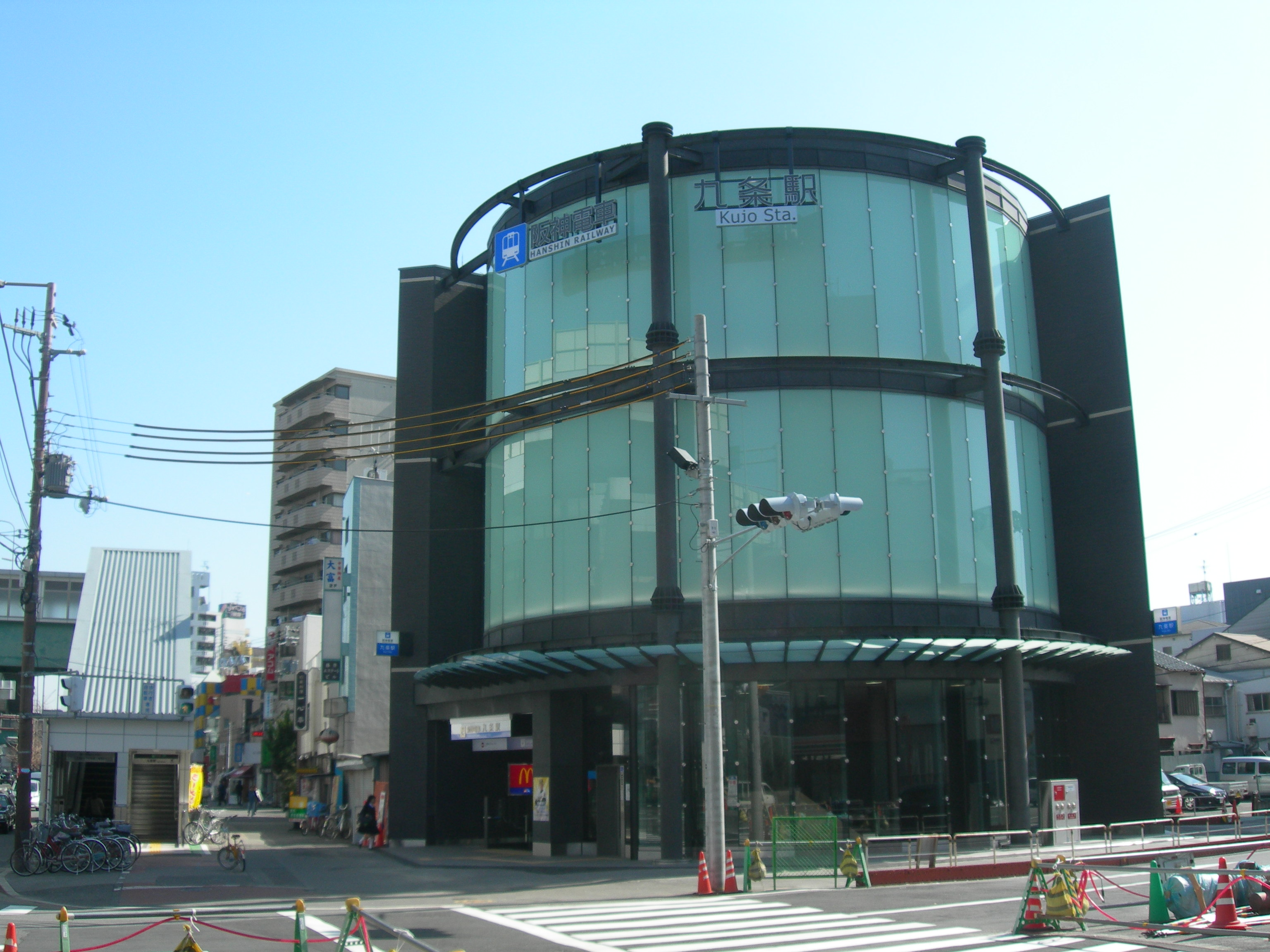 阪神 九条駅